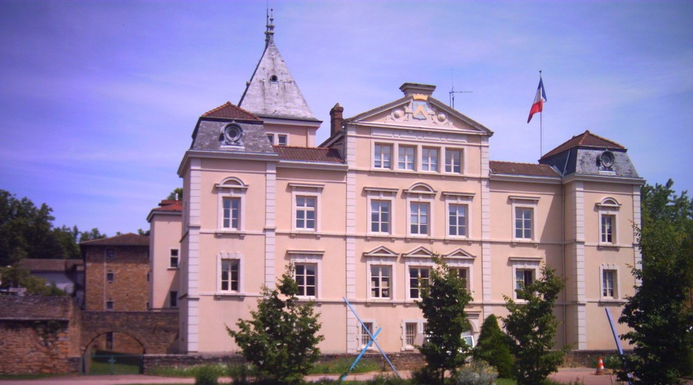 La mairie, ancien château d'Ombreval (façade ouest)